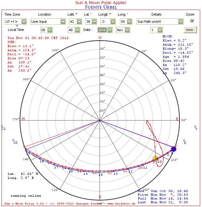 Minor lunar standstill